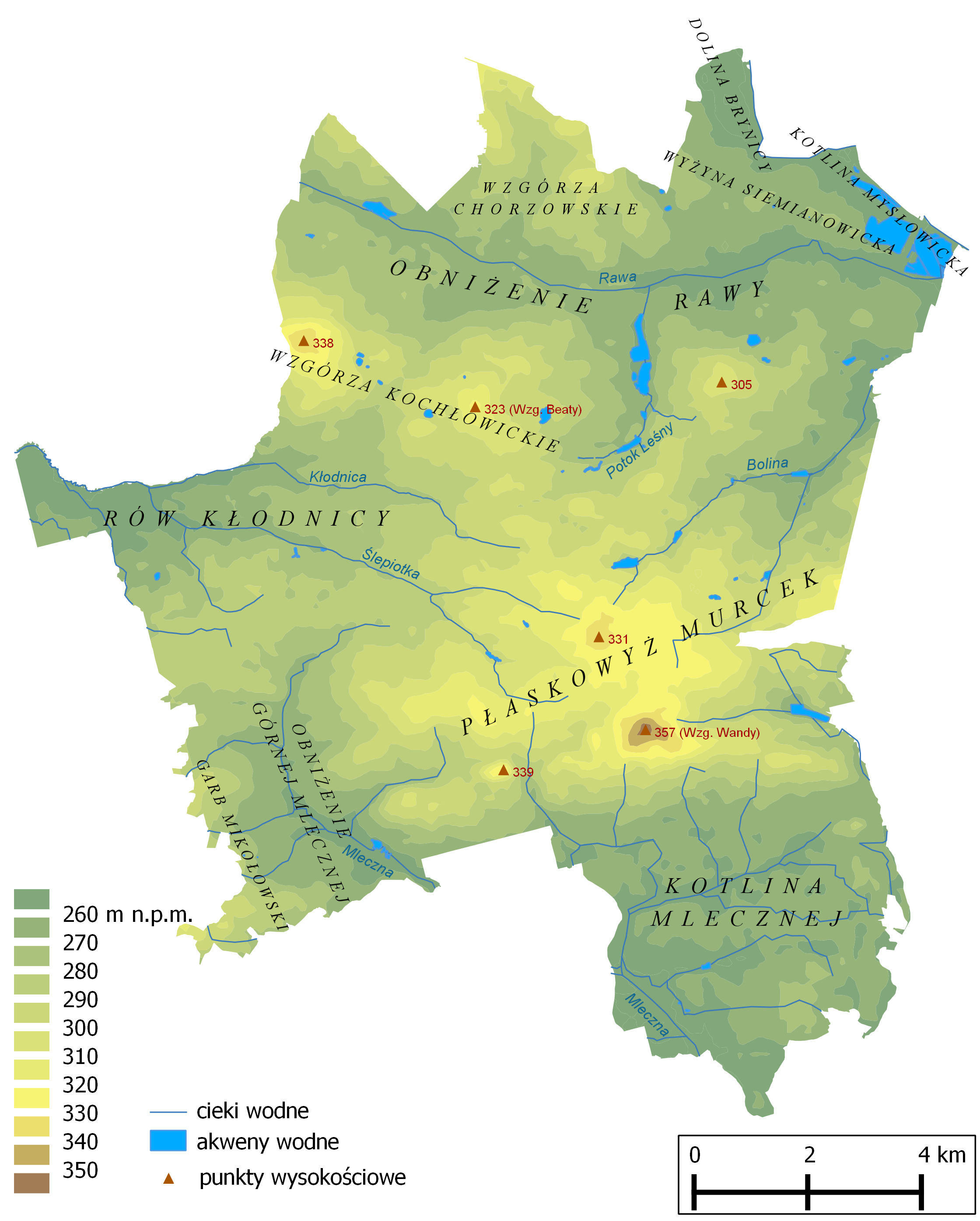 Mapa ogólnogeograficzna Katowic This PNG graphic was created with QGIS